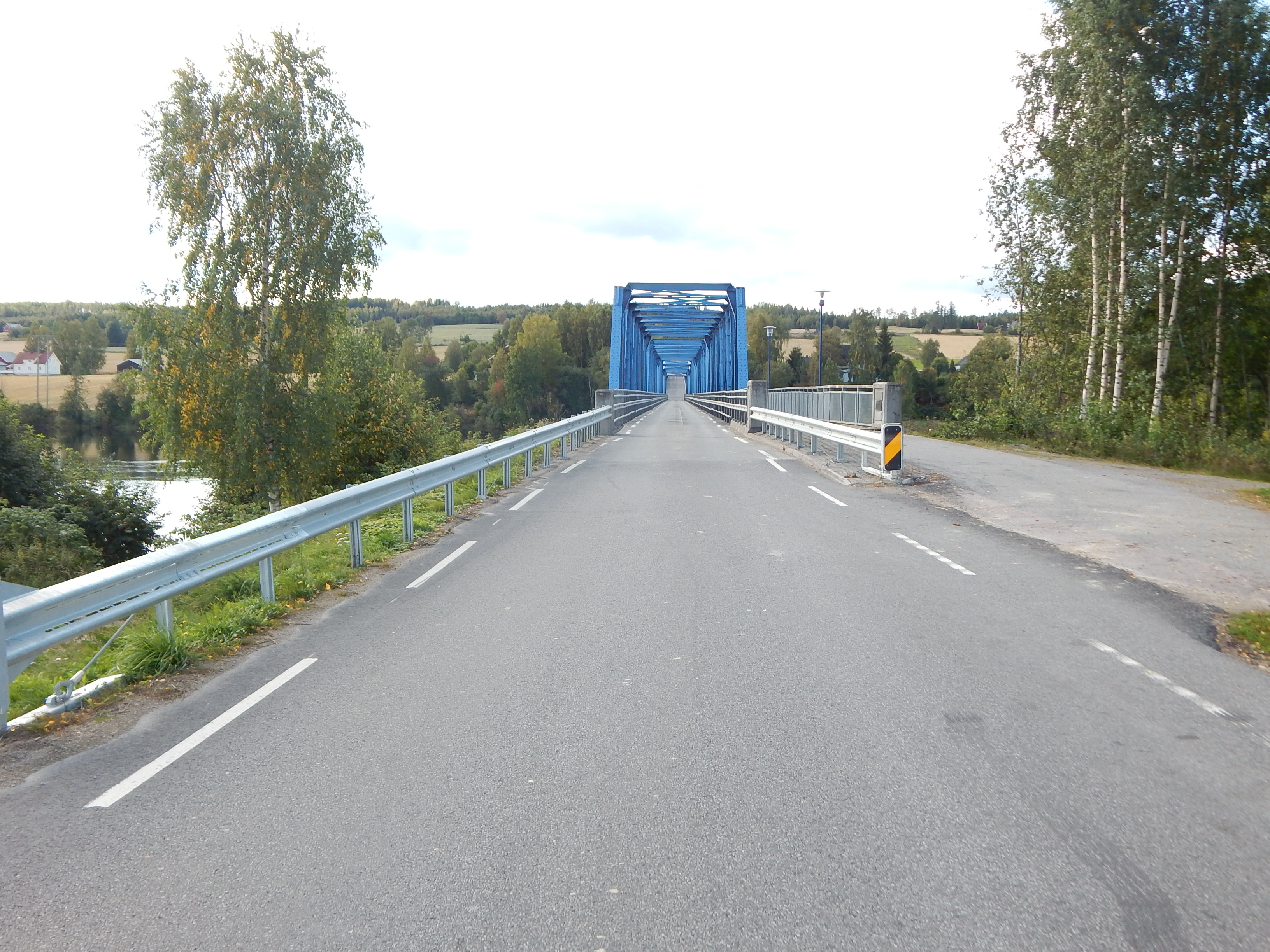 Bruvegen (fylkesvei 406) mot Sandstad bru østfra